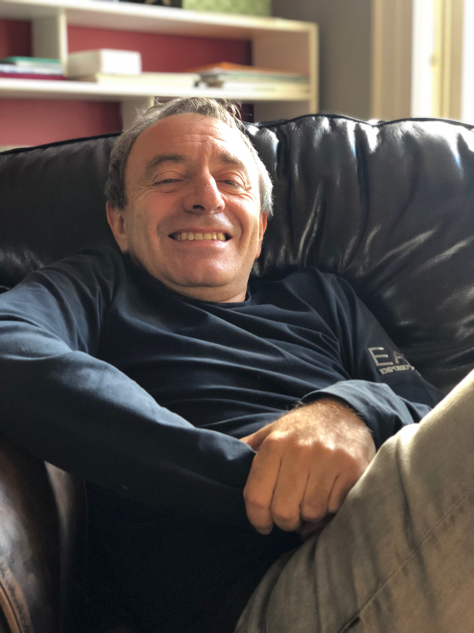 L'editore italiano Nicola Raffaele Di Matteo